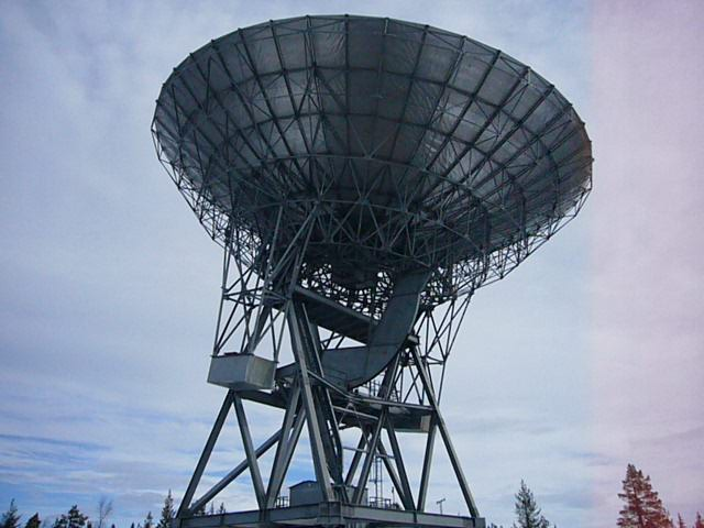 EISCAT radar dish in Kiruna